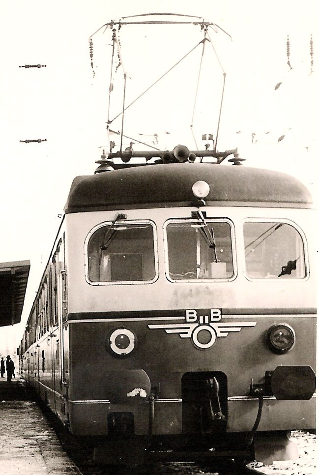 ÖBB-Triebwagen 4030.02 in Rosenheim. Die Nummerierung .02 (statt .002) ist belegt durch ein Foto des gleichen Zuges am gleichen Tag in München Hbf